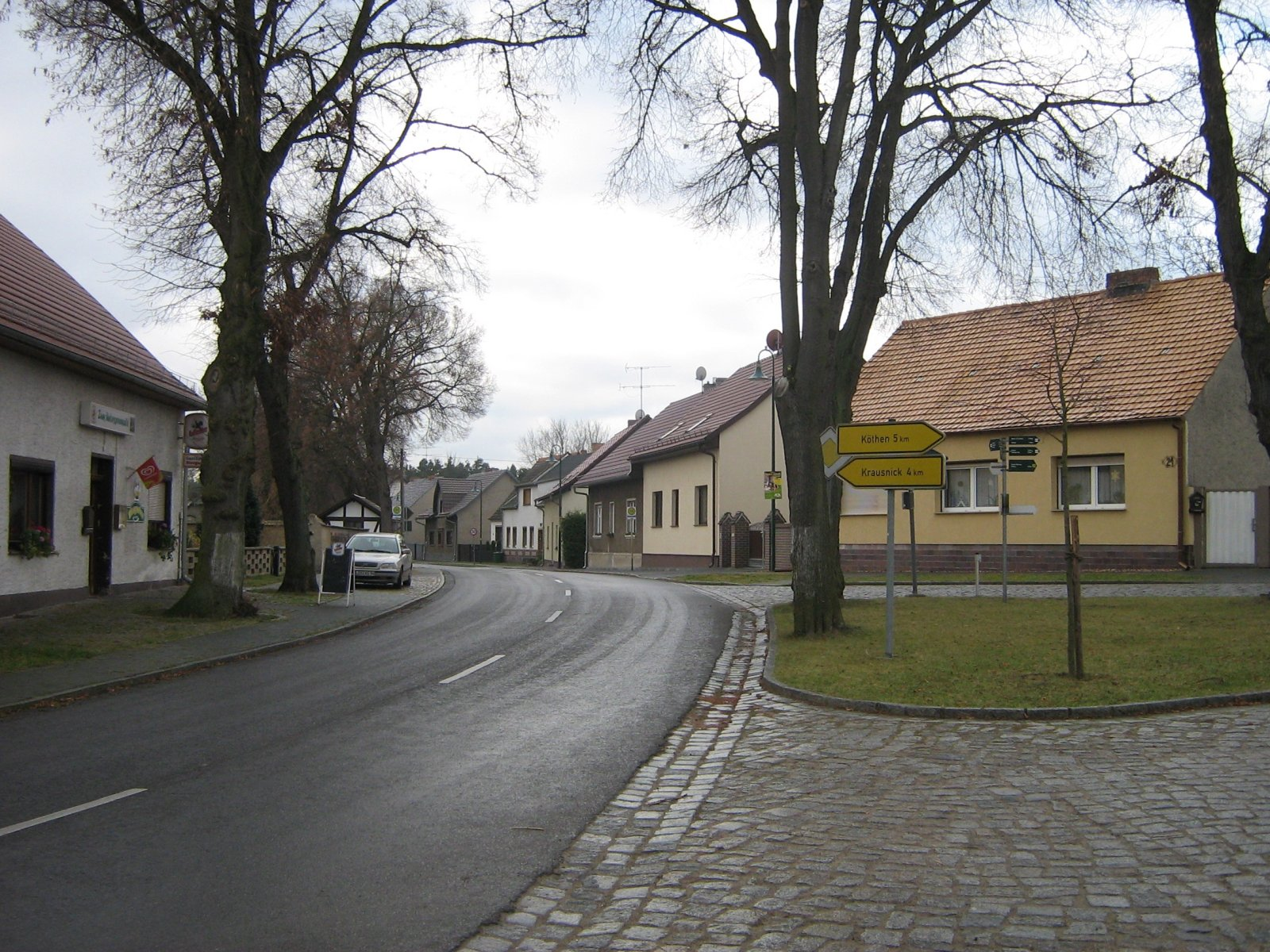 Groß Wasserburg, Gemeinde Krausnick-Groß Wasserburg, Landkreis Dahme-Spreewald, Brandenburg, Deutschland (Germany) - Dorfstrasse in Groß Wasserburg